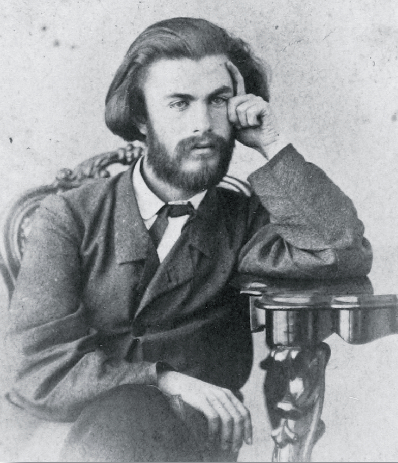 Mykhaylo Drahomanov